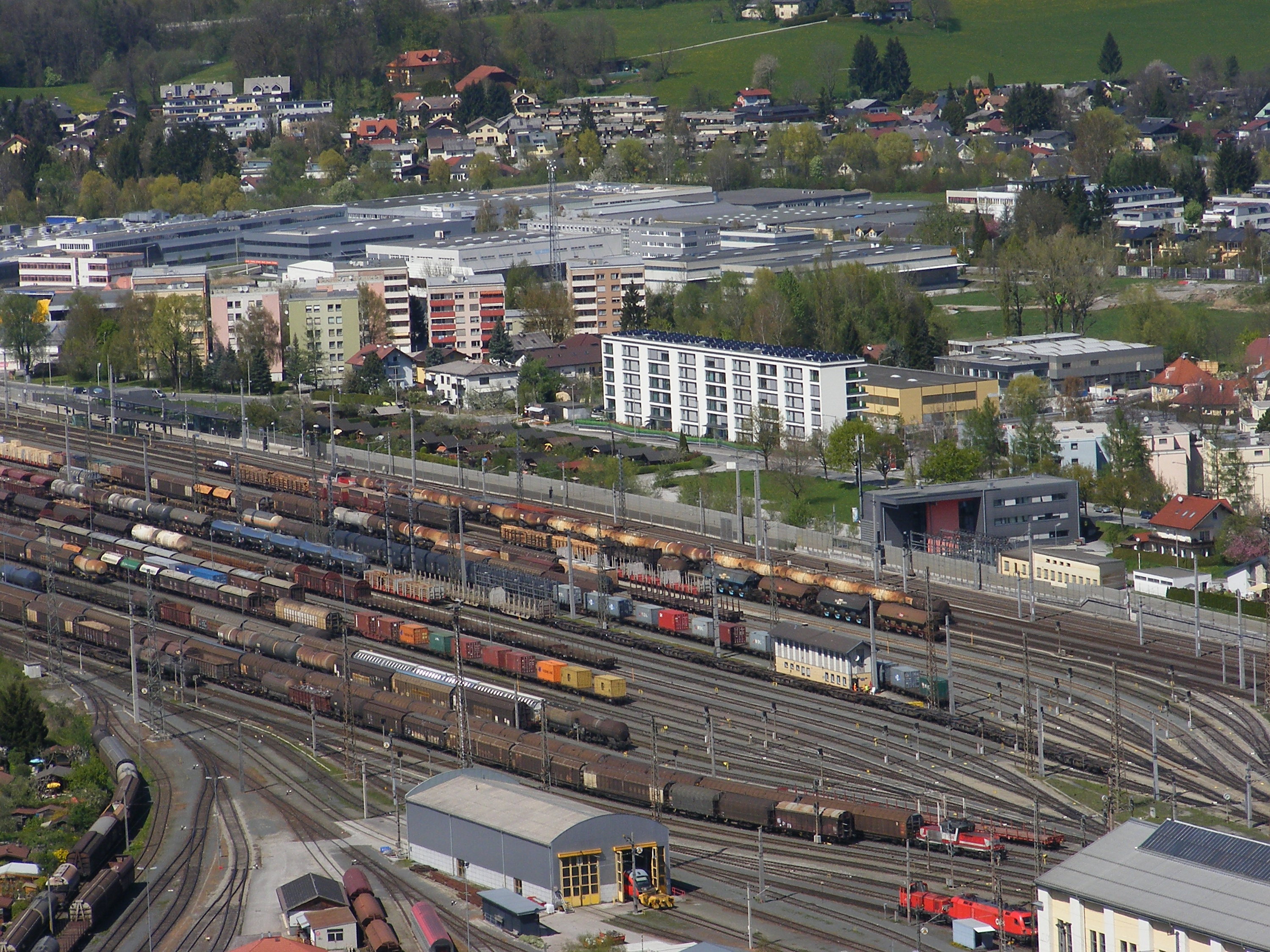 Frachten- bzw. Verschiebebahnhof in Gnigl und Schalmmoos, Stadt Salzburg